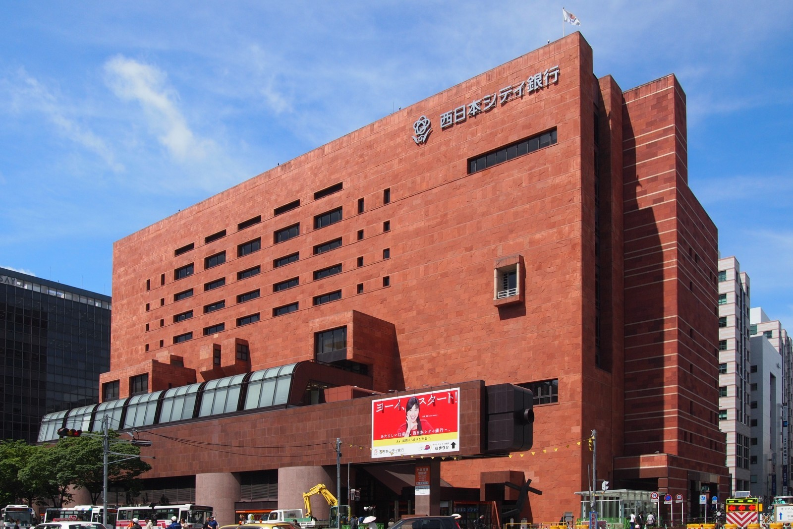 福岡市博多区 西日本シティ銀行本店 Zoner Photo Studio 11にて各種補正済み